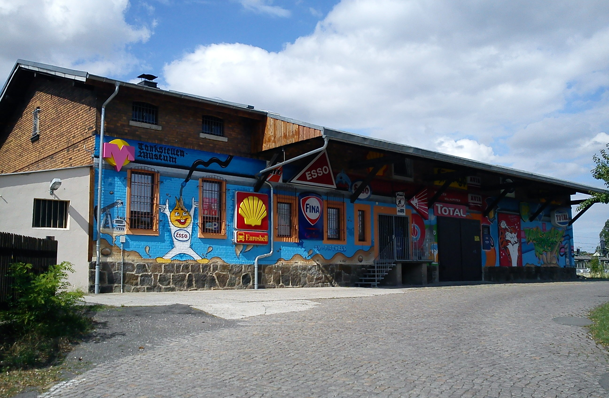 Das Tankstellenmuseum im alten Güterschuppen von Borsdorf bei Leipzig. Anmerkungen:Standort: 51.345198, 12.539851